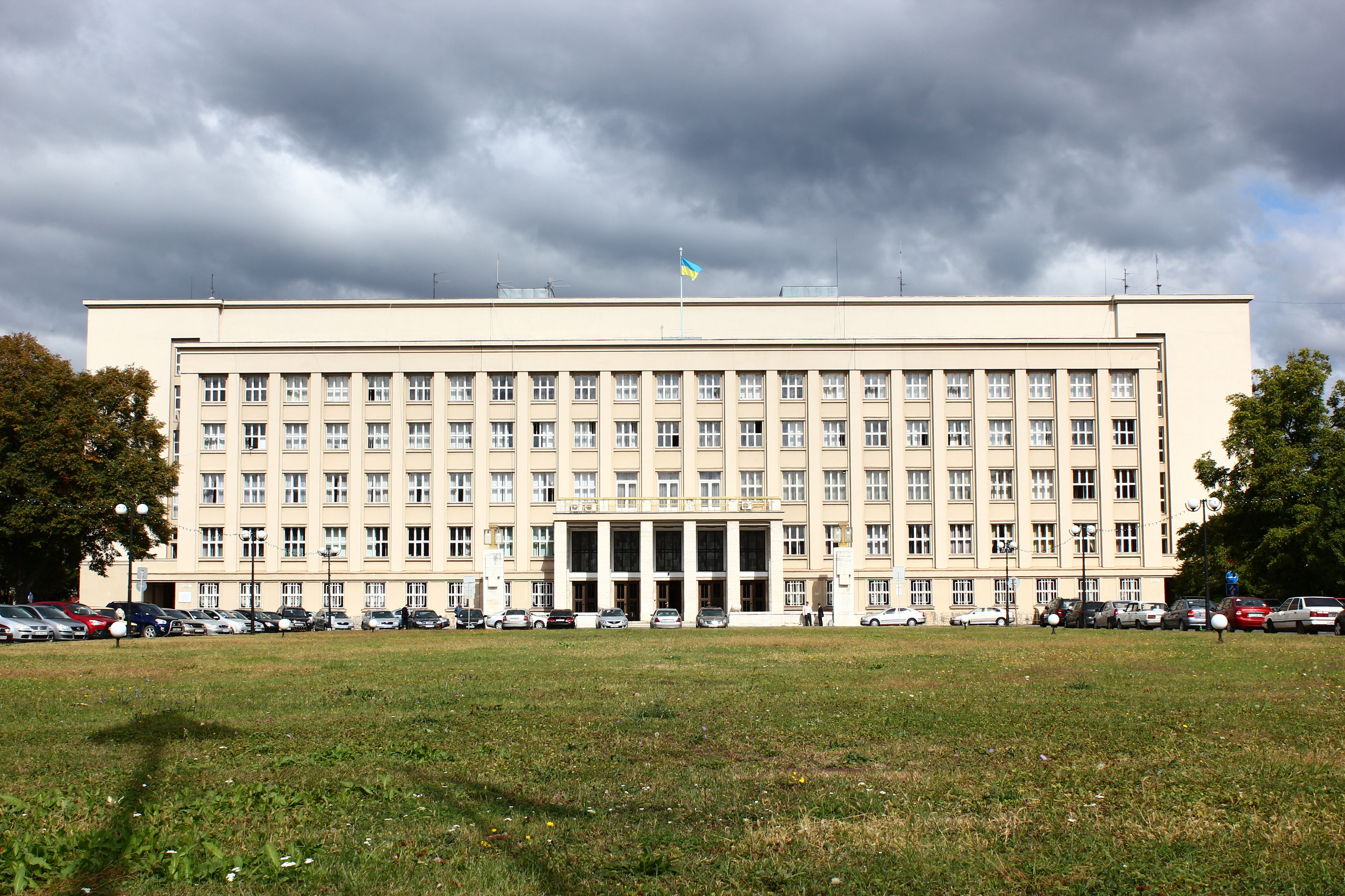 Das Gebäude der Oblastverwaltung von Transkarpatien, Uschhorod.